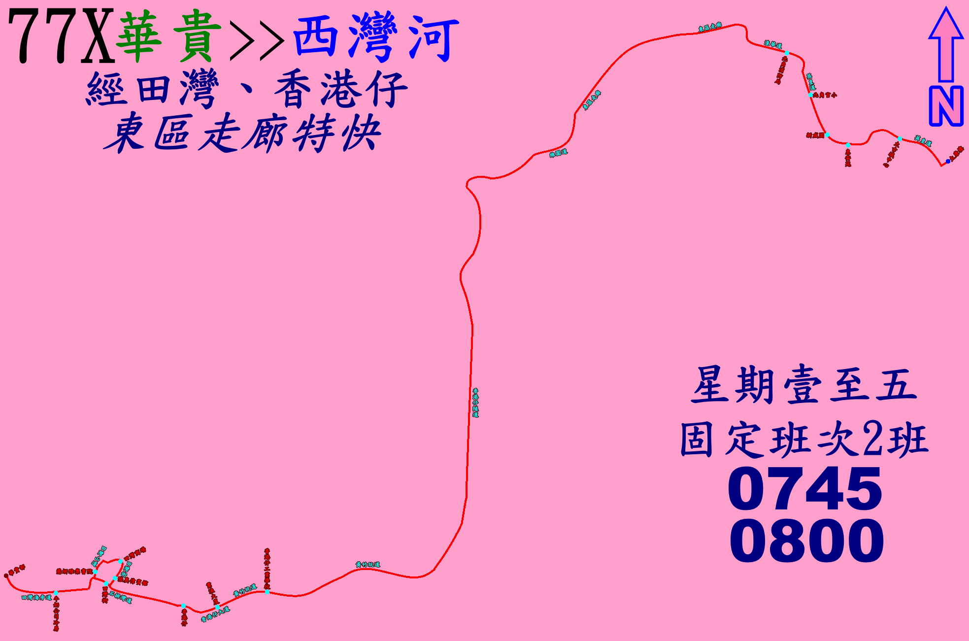 中文（香港）: 城巴77X線的走線圖